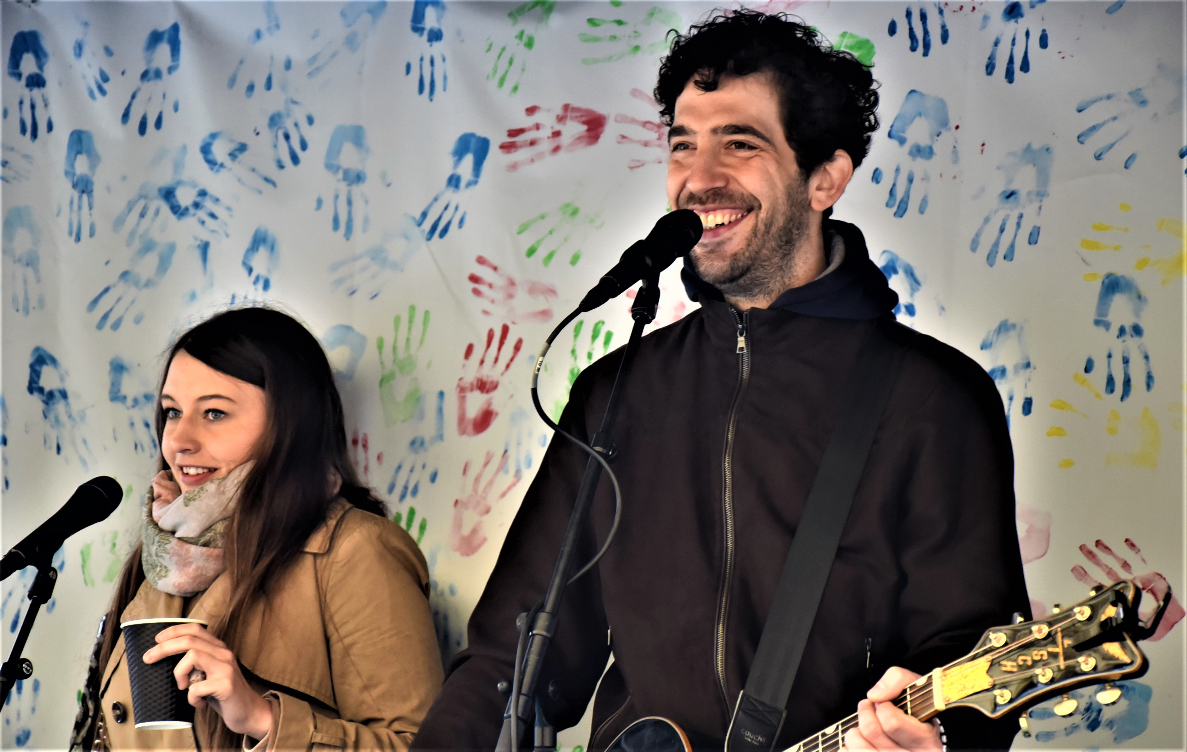 Kateřina Marie Tichá, česká zpěvačka a Jindra Polák, frontman skupiny Jelen